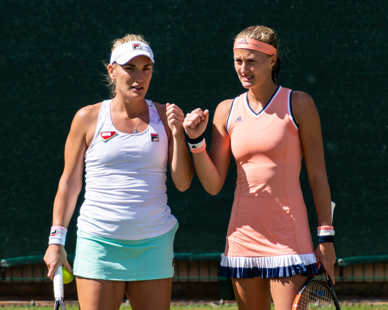 Kiki Mladenovic & Timea Babos